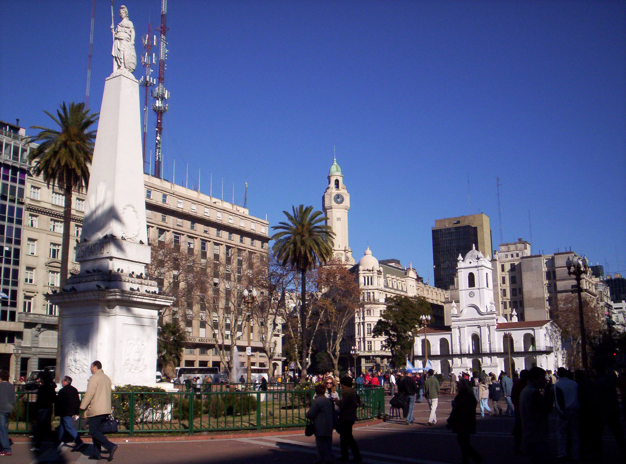 Plaza de Mayo